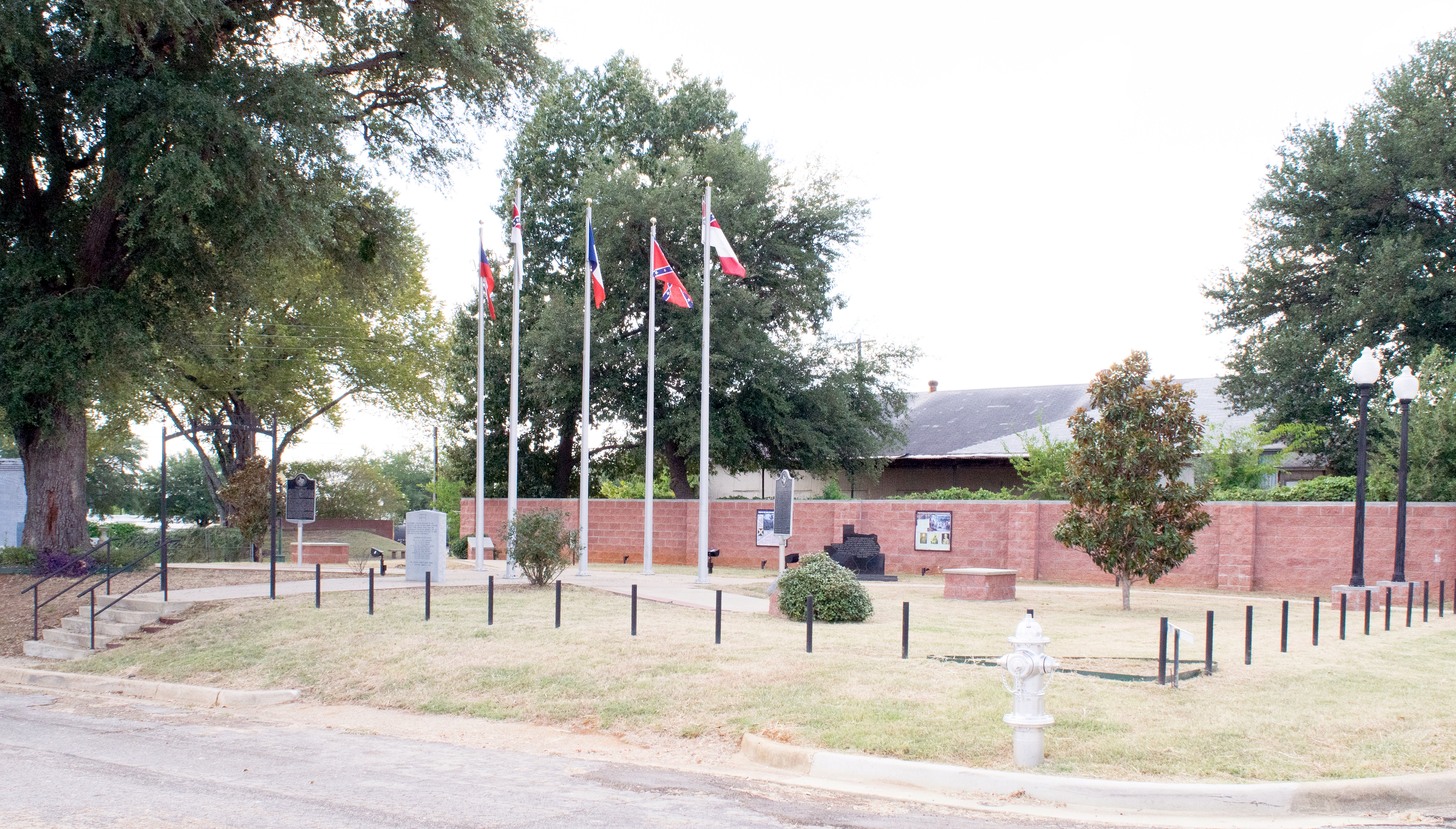 Confederate Veterans Memorial Plaza, Palestine, Texas.